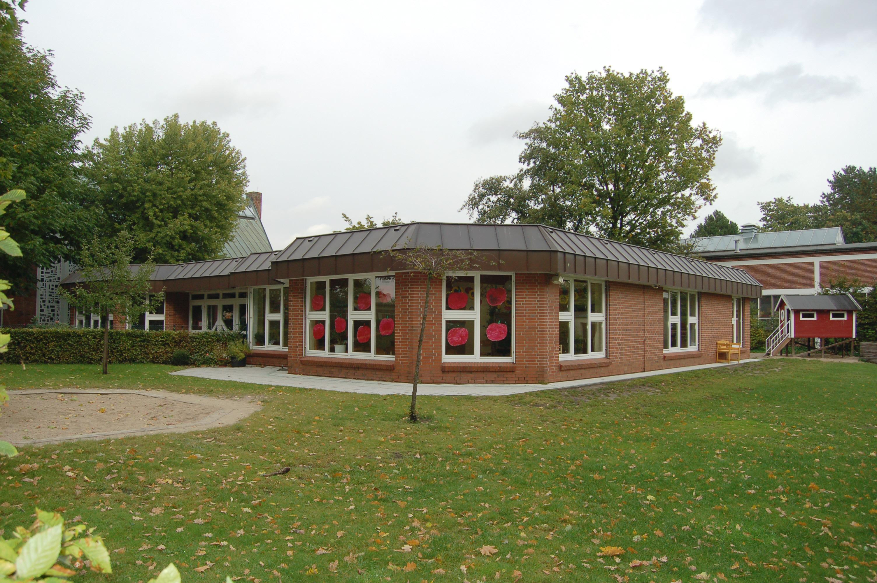 Der Kindergarten neben der Erlöserkirche in Uetersen.